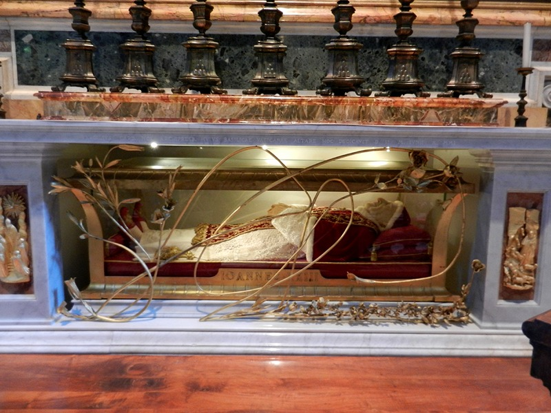 Città del Vaticano - Tomba del B. Giovanni XXIII nella Basilica di S. Pietro